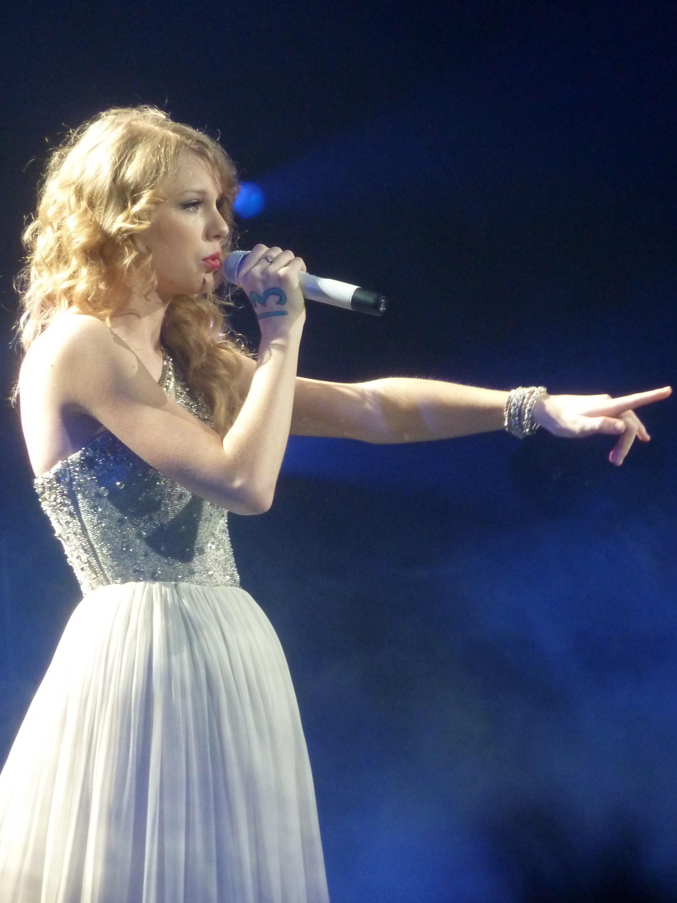 Taylor Swift en concert à Paris en Mars 2011